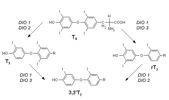 Die deutsche Version von "Image:Iodothyronine deiodinase.png" erstellt